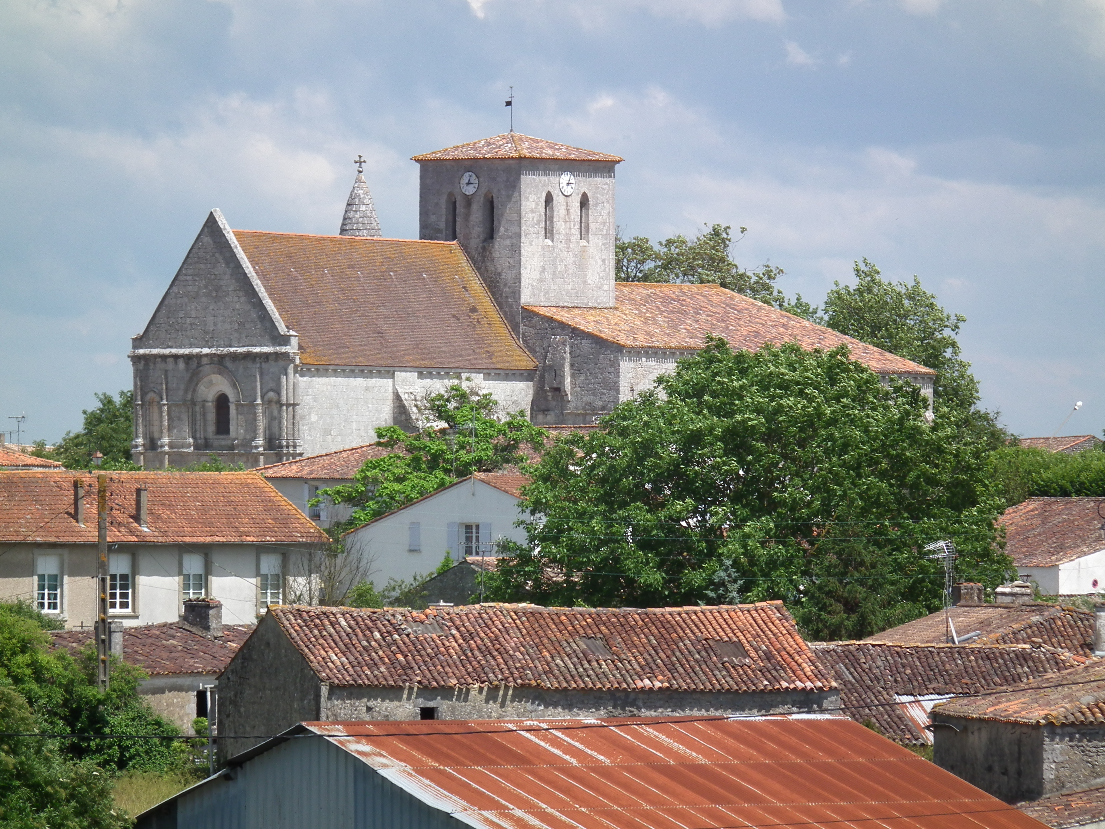 Vue du village de Meursac, dominé par son église des XIIe et XIIIe siècles.